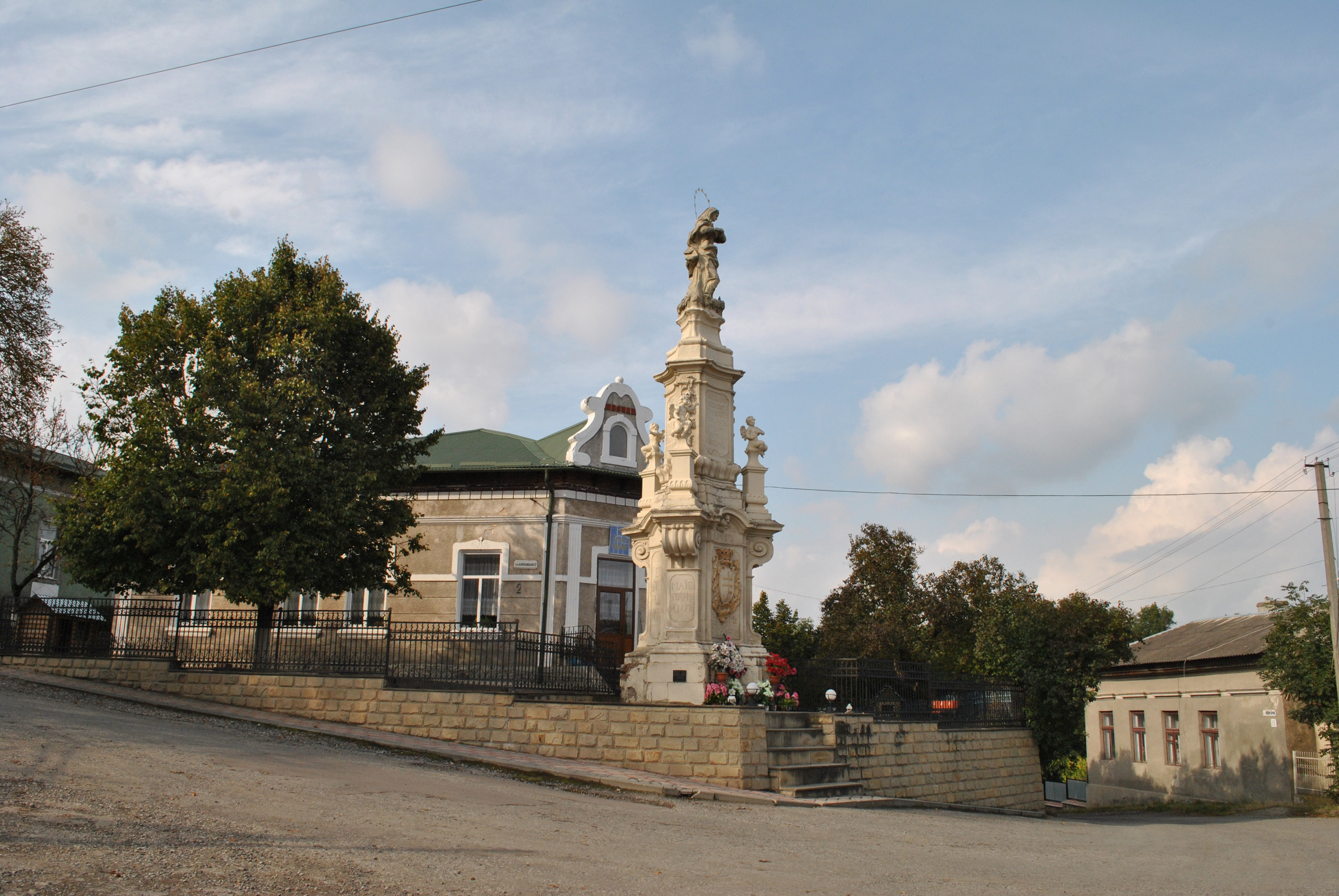 Скульптура Матері Божої в Бучачі Тернопільської області на вул. Б. Хмельницького, 2, біля дитсадку «Сонечко» (неподалік художньої школи)